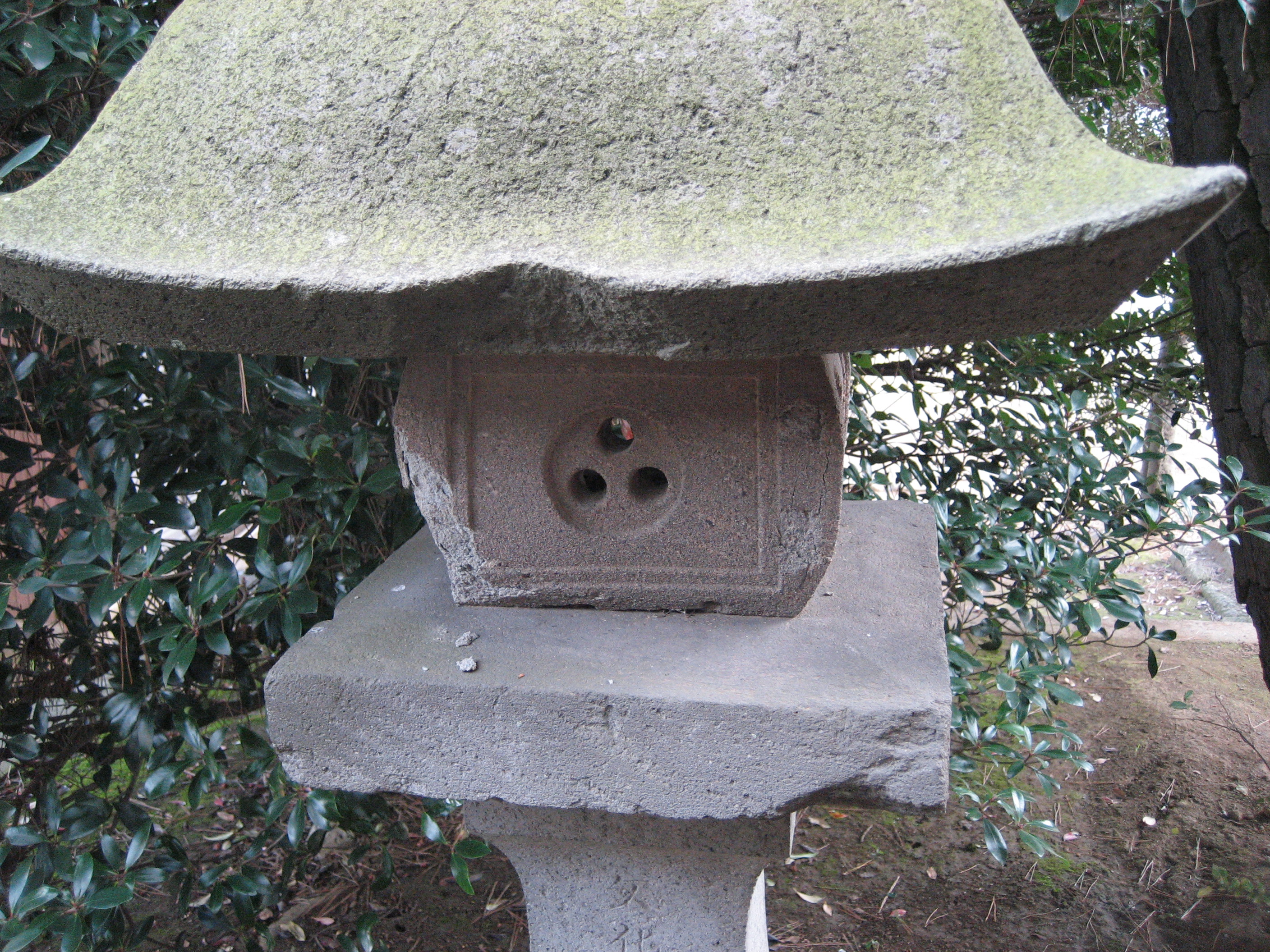 "tourou in tango,三郷市丹後神社の灯籠。三つの穴が開いている。"